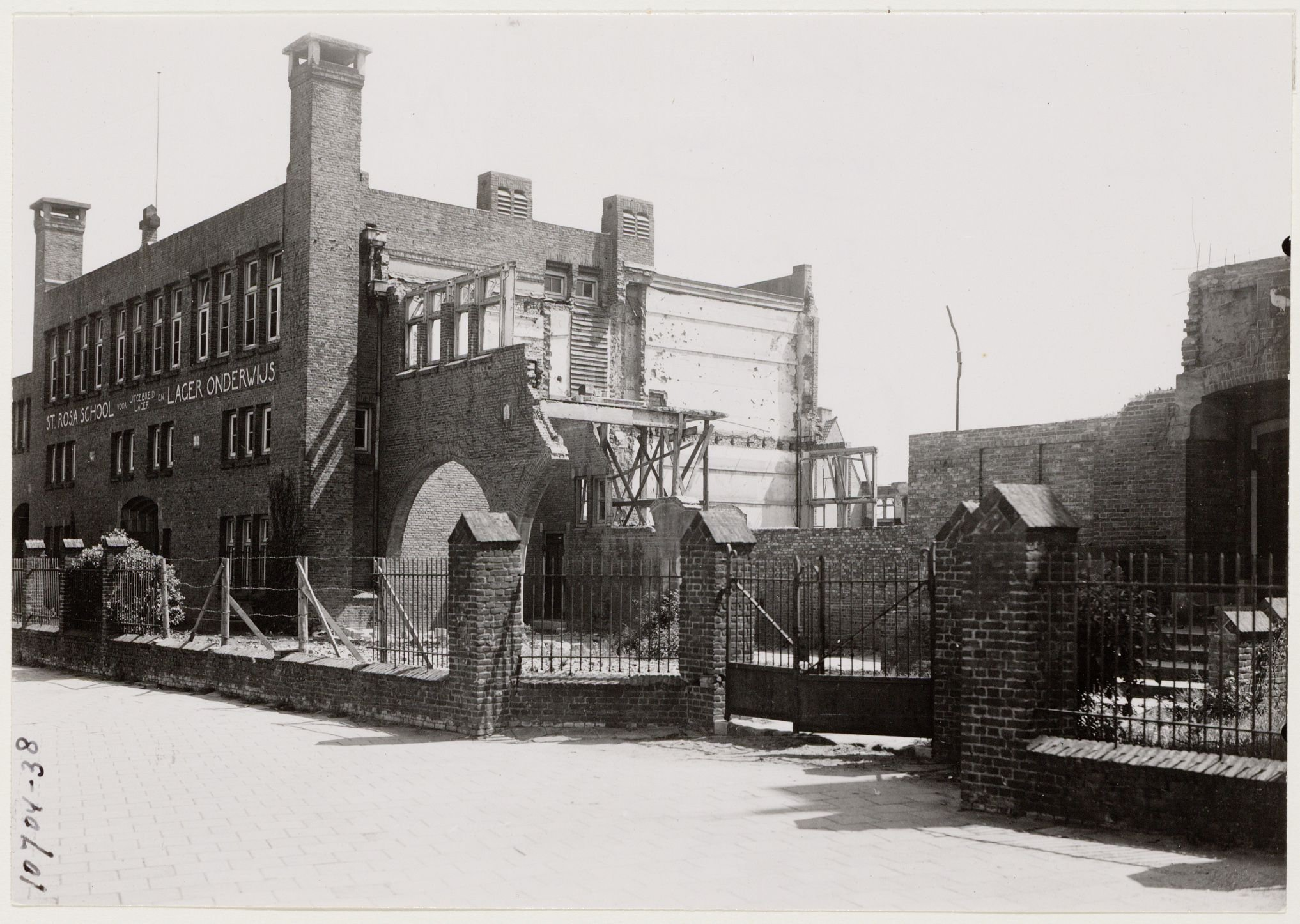 Wingerdweg Sint Rosaschool, beschadigd door bombardement..